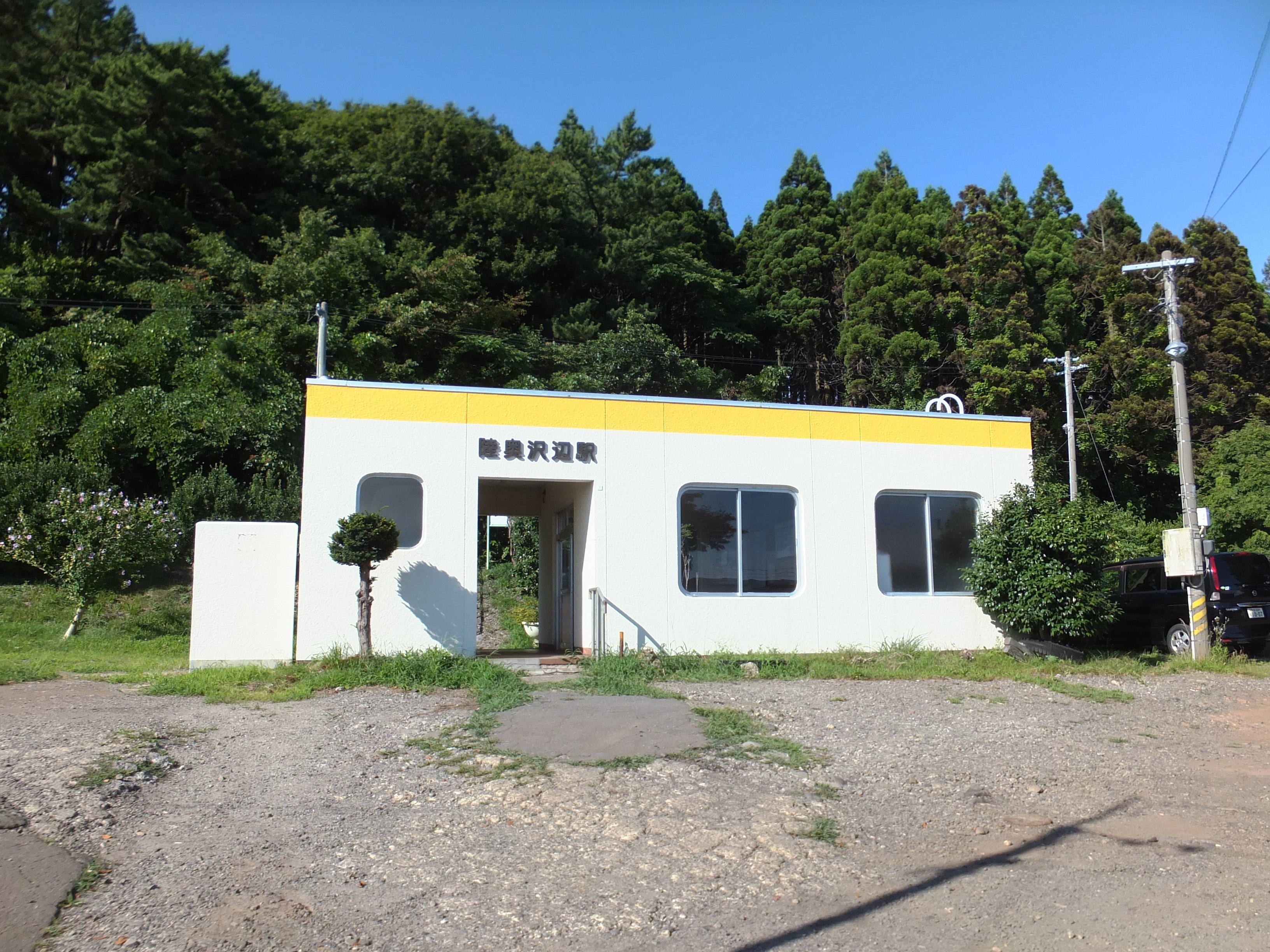 五能線 陸奥沢辺駅。東八森駅・大間越駅と同一構造の駅舎である。